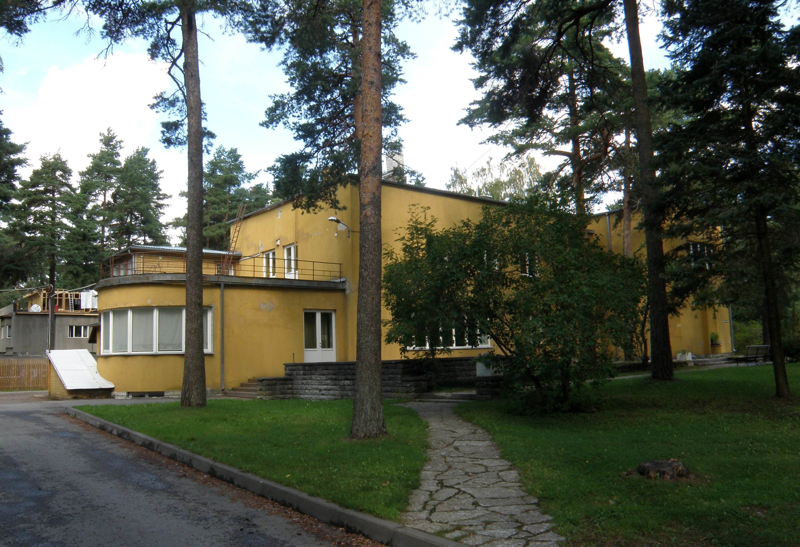 Nurme 40